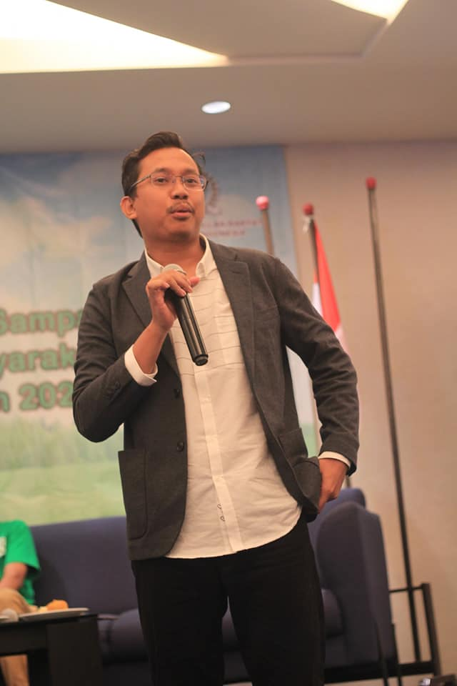 Gus Muhdlor menjadi pembicara dalam acara Komunitas Sido Resik